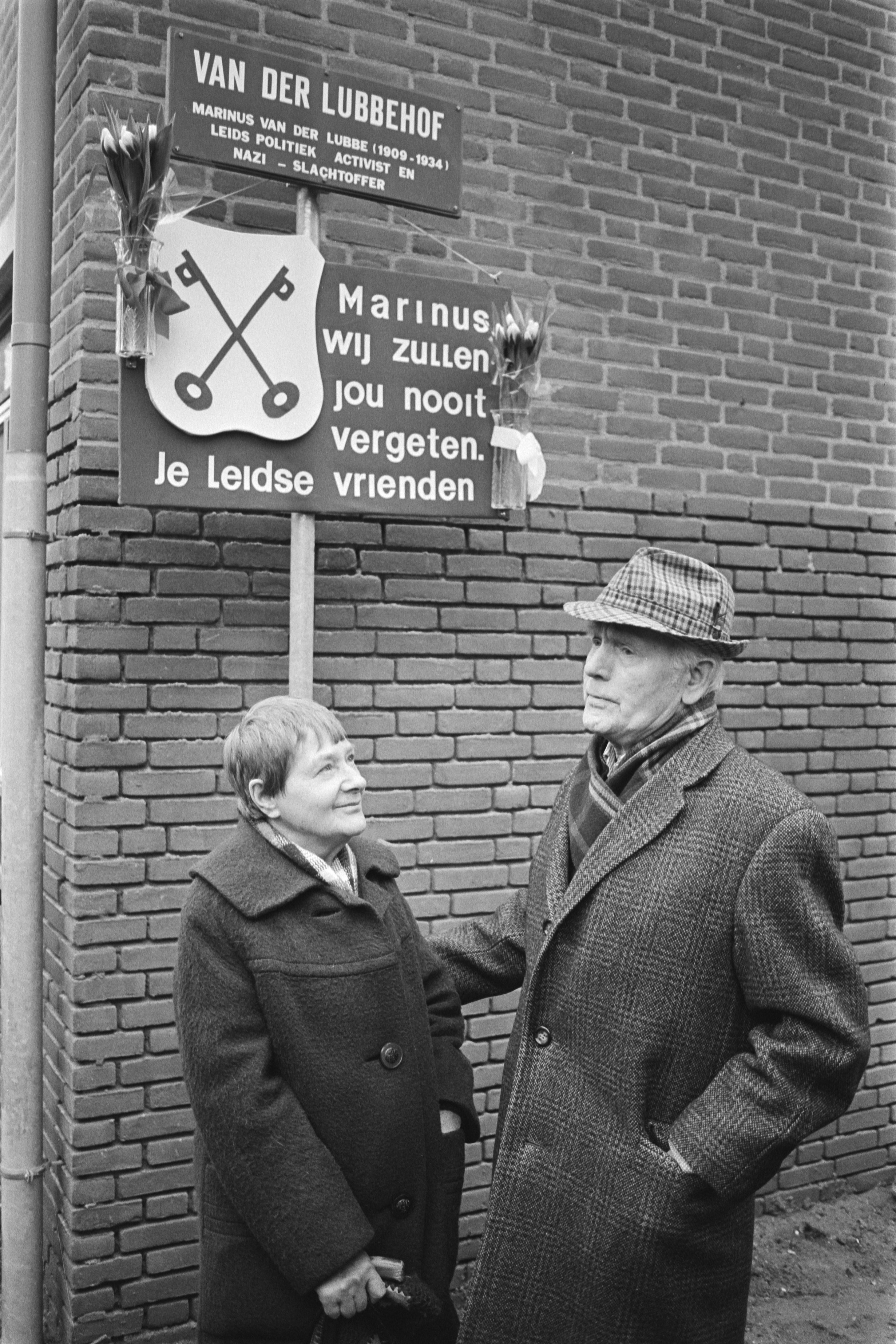 Collectie / Archief : Fotocollectie Anefo Reportage / Serie : [ onbekend ] Beschrijving : Onthulling naambord Van der Lubbehof in Leiden (Marinus van der Lubbe); voormalig huisgenoot Koos Vink onthulde het bord Datum : 10 januari 1984 Locatie : Leiden, Zuid-Holland Trefwoorden : ECHTGENOTES, onthullingen, straatnamen Persoonsnaam : Koos Vink, Van der Lubbehof Fotograaf : Antonisse, Marcel / Anefo Auteursrechthebbende : Nationaal Archief Materiaalsoort : Negatief (zwart/wit) Nummer archiefinventaris : bekijk toegang 2.24.01.05 Bestanddeelnummer : 932-8288 Reacties Geplaatst door Frits Nieuwenburg op 17 januari 2008 - 02:06. Van (communist) Marinus van der Lubbe werd beweerd dat hij op 27 februari 1933, eigenhandig het Rijksdaggebouw (der Reichstag) in Berlijn in brand had gestoken. Tegenwoordig hangt men meer de theorie aan dat hij als zondebok werd gebruikt om de communisten (aardsvijanden van het nationaal socialisme in Duitsland) voor eens en voor altijd het zwijgen te doen opleggen.